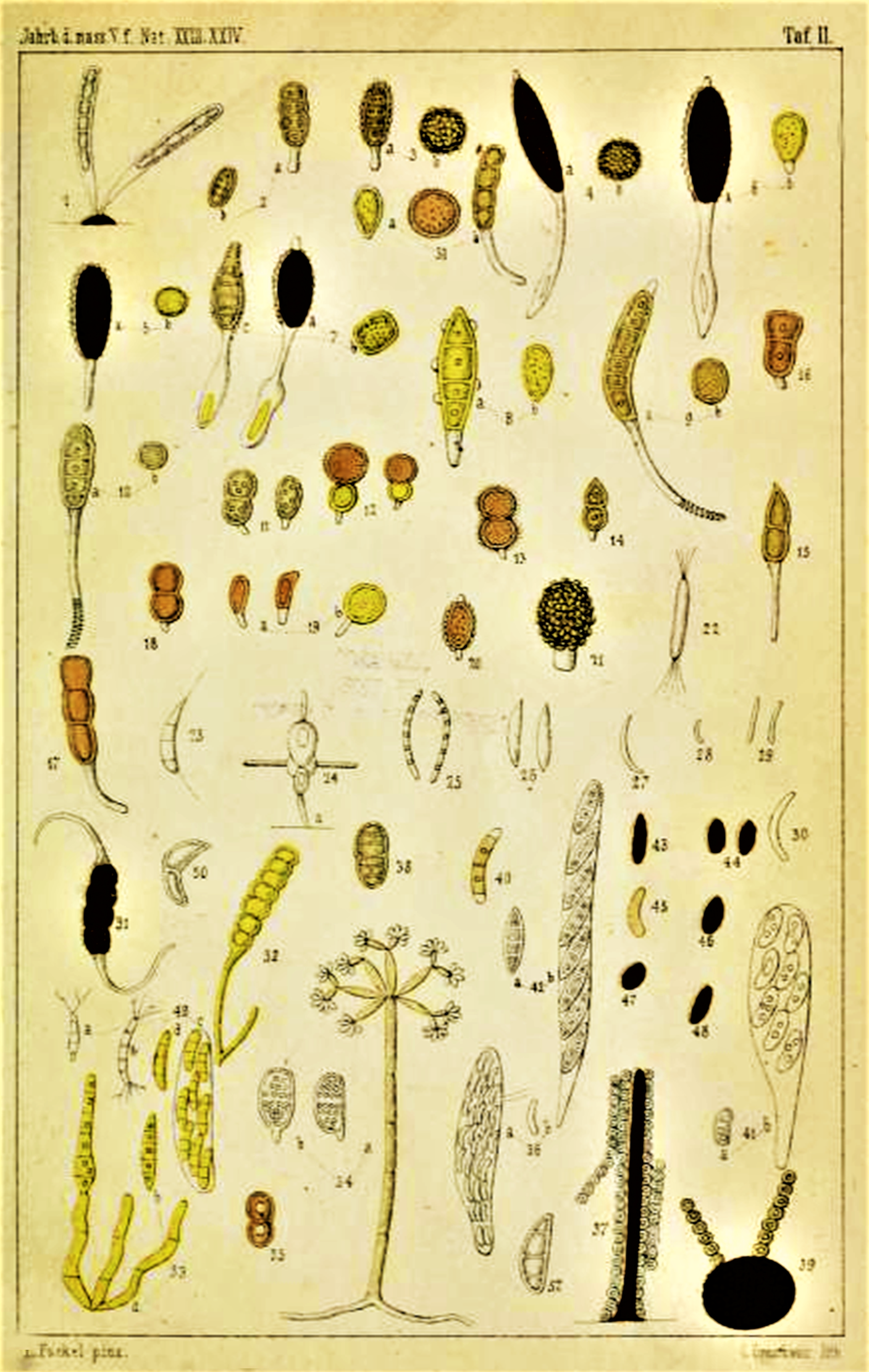 Tafel II von Leopold Fuckel (1821-1876): Symbolae mycologicae - Beiträge zur Kenntnis der Rheinischen Pilze, v. 1, Wiesbaden 1869